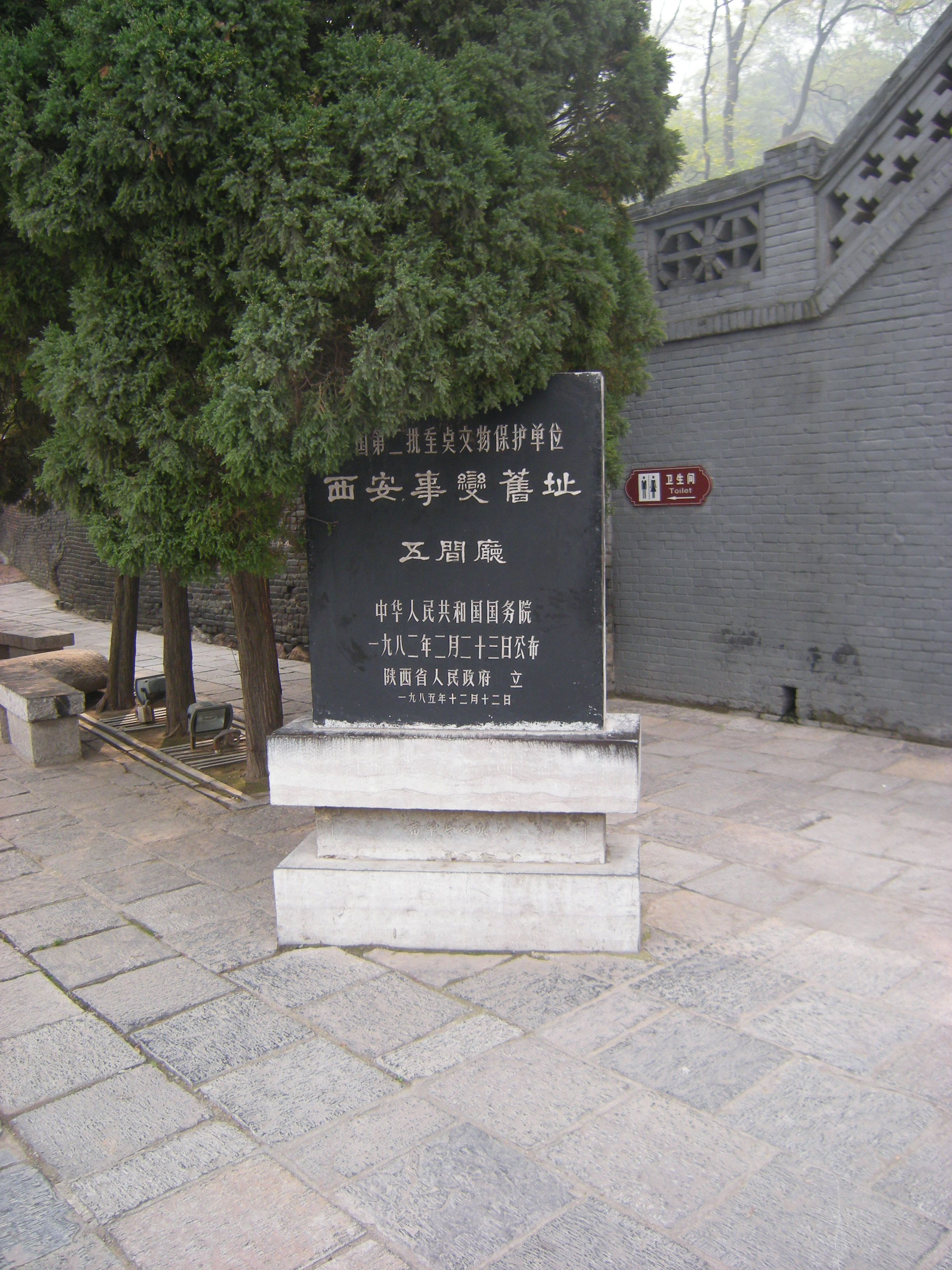 西安事变纪念碑